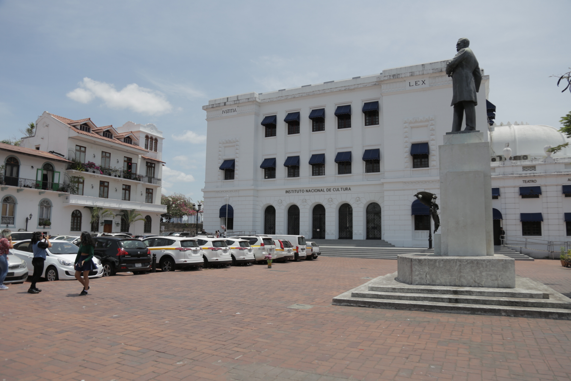 Casco Antiguo Ciudad de Pananá. Edificio del Instituto Nacional de Cultura parte del conjunto monumental histórico declarado Patrimonio de la Humanidad por UNESCO.